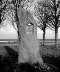 (Menhir "Langer Stein" von Ober-Saulheim, Kreis Alzey-Worms in Rheinland-Pfalz) (für die GNU-FDL)